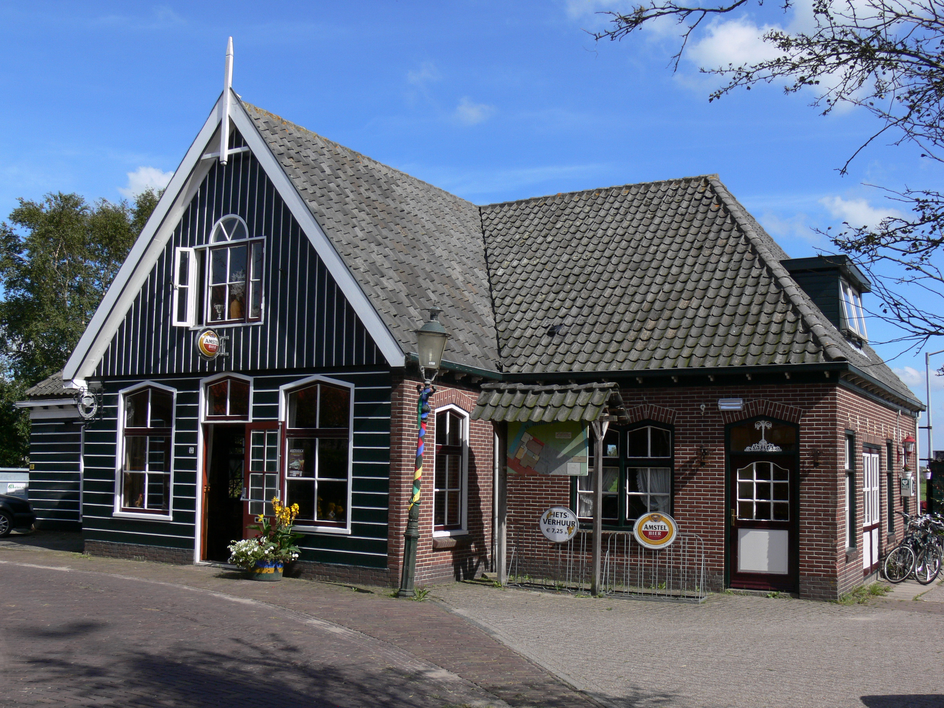 19e eeuws PAND op T-vormige plattegrond, deels uit steen, deels uit hout opgetrokken. Pannen schilddak. Over de vooruitspringende korte arm een zadeldak met houten puntgevel. Vensters met keperboogvormige bekroning. In de topgevel een rondboogvensters met zijlichten. Zie ook K. B. nr 8 d.d. 19 september 1980.